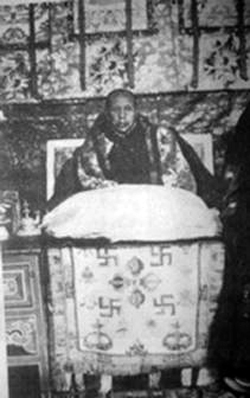 达扎·阿旺松绕图多旦巴杰增